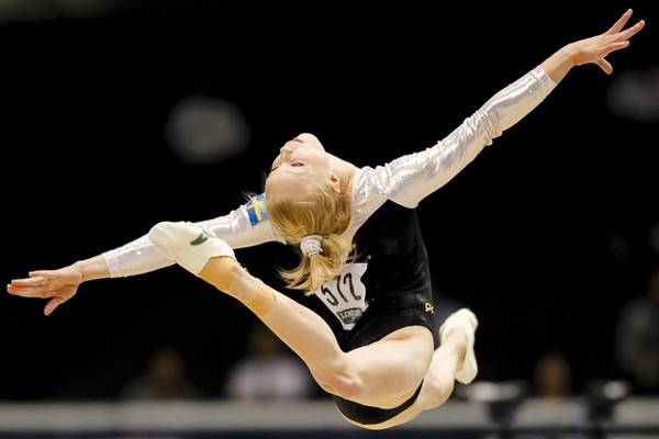 Jonna Adlerteg VM 2011 i fristående